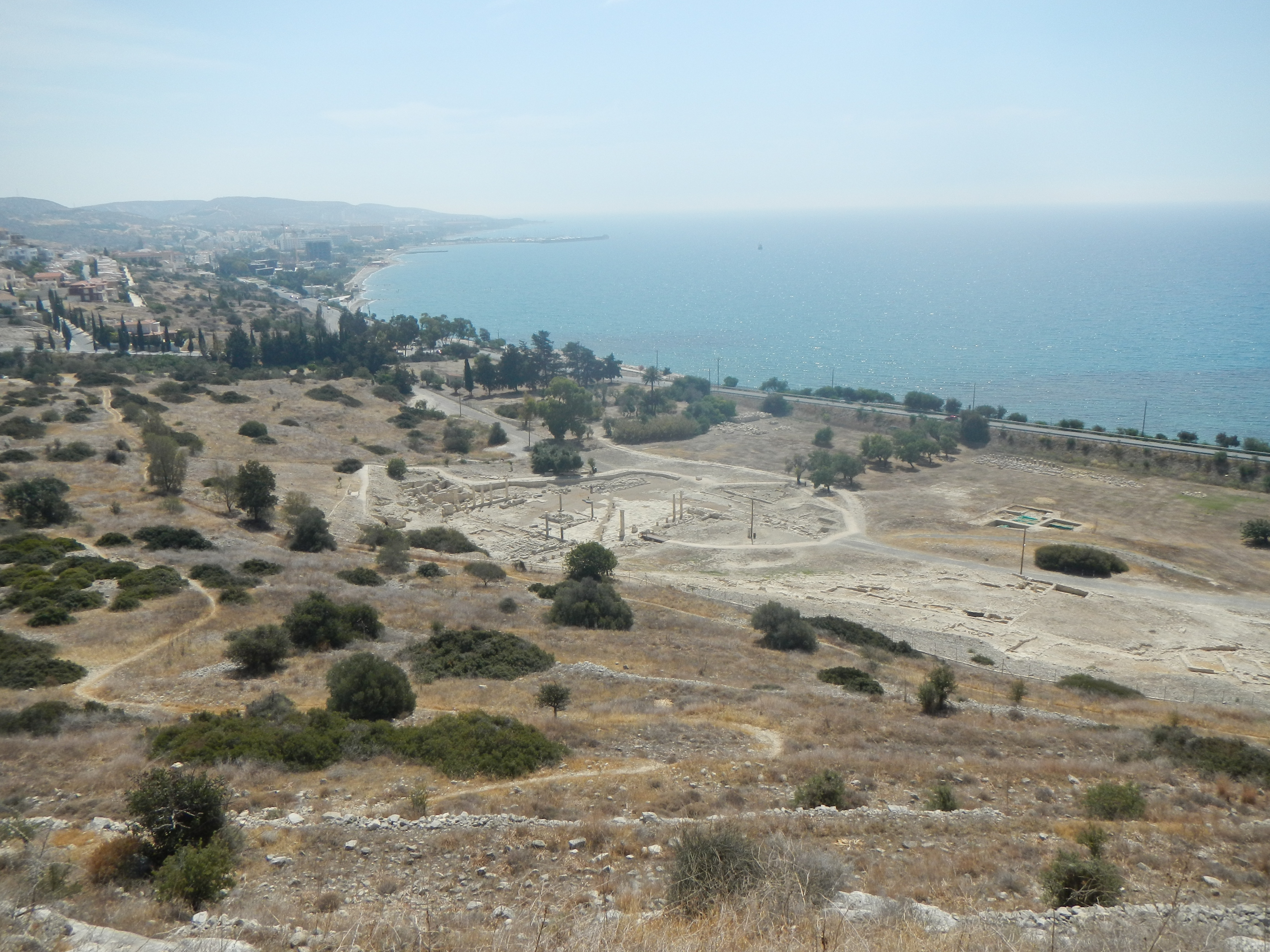 Панорама руин Аматуса